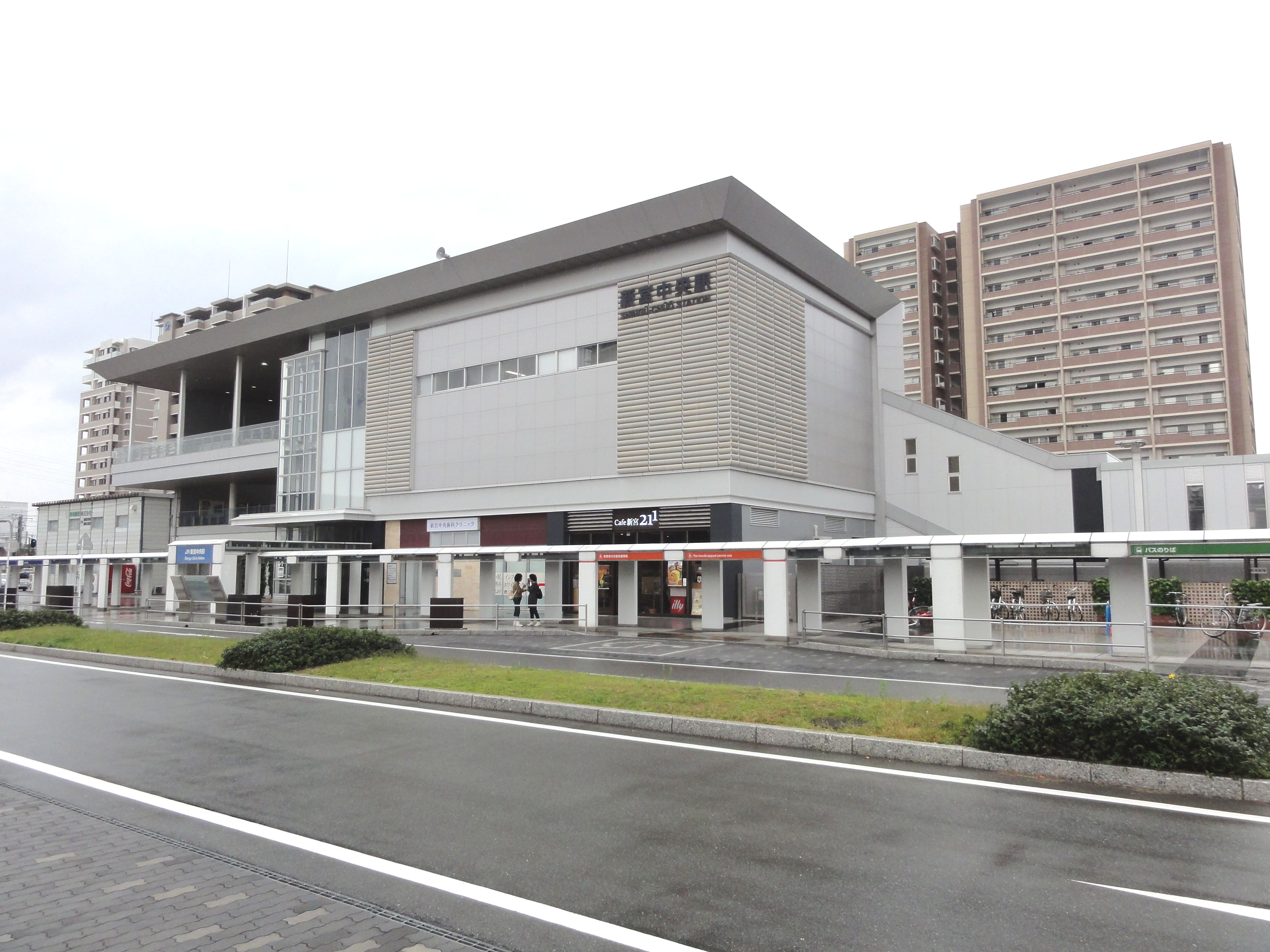 新宮中央駅